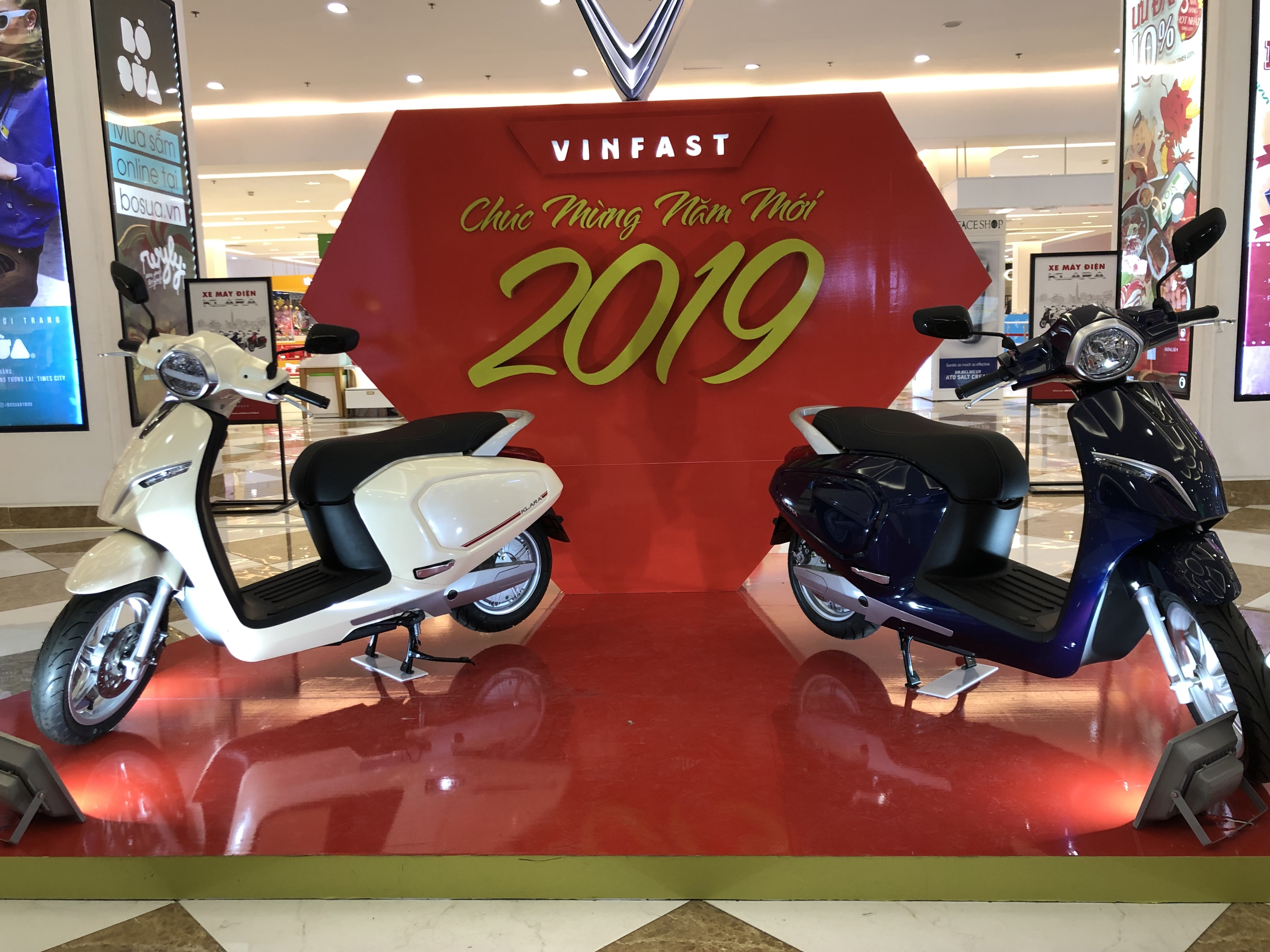 Xe máy điện VinFast Klara bản pin và acquy tại Times City